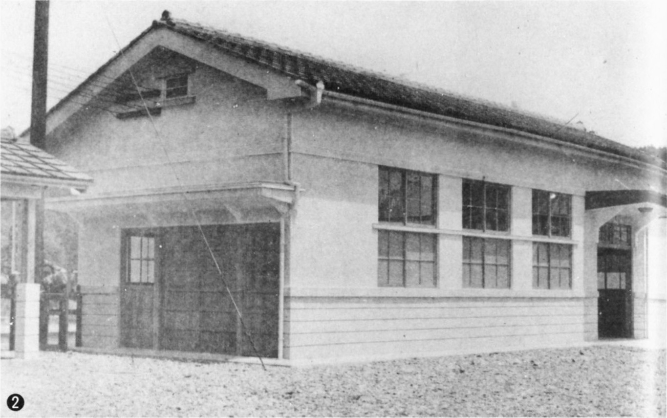 開業当時の紀勢本線下里駅。